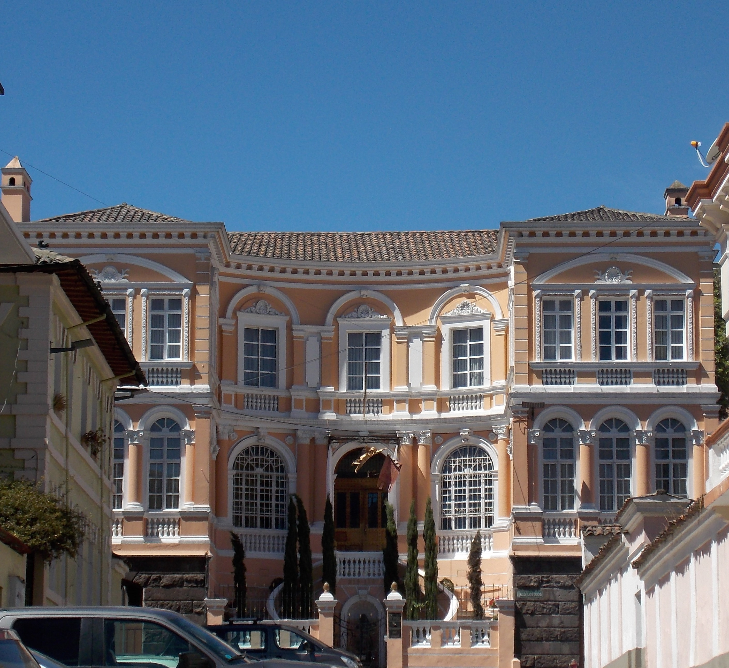 El Palacio Cordovez, en el sector de La Alameda, visto desde el pasaje Gándara.